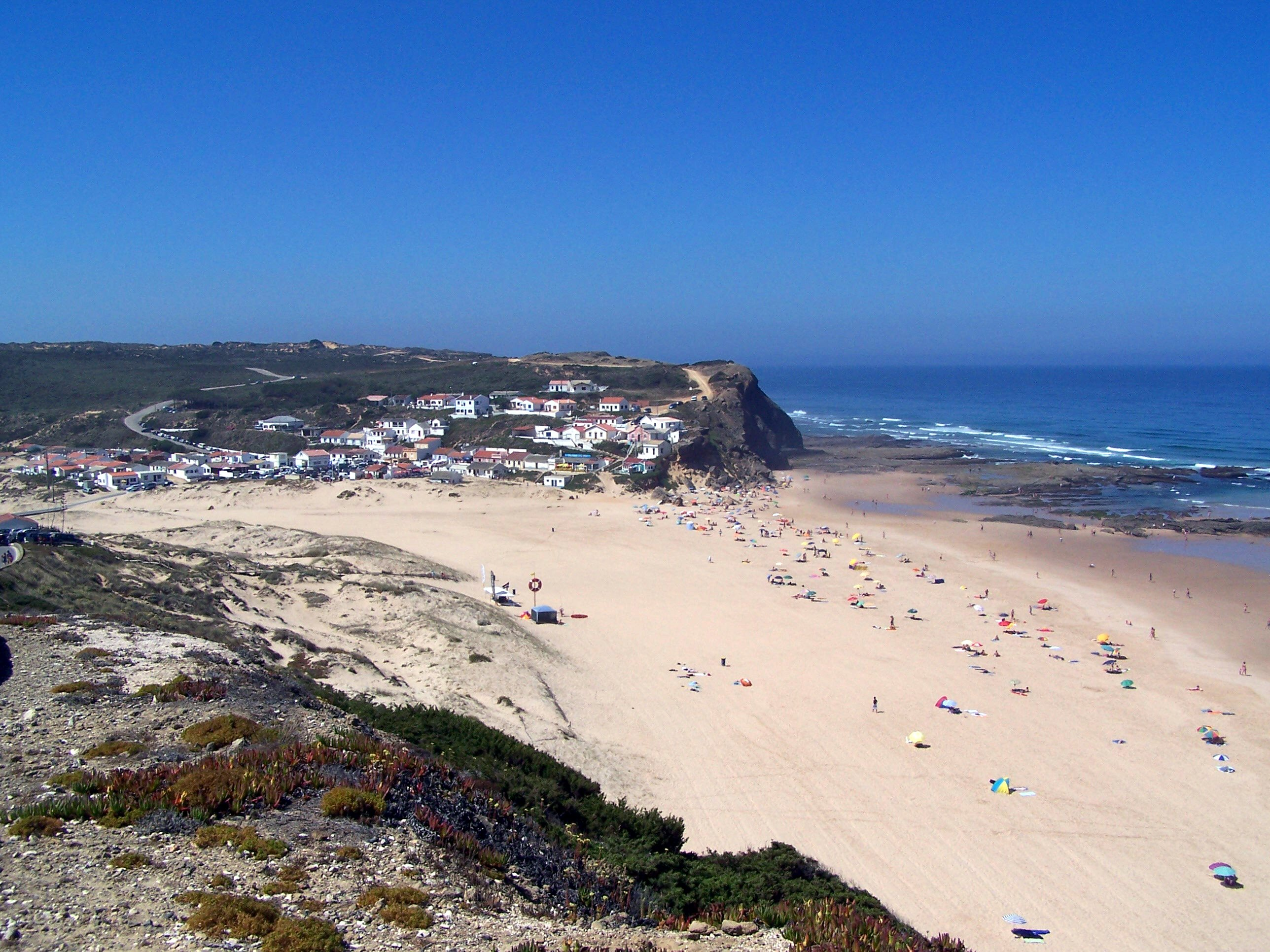 Praia do Monte Clérigo - I